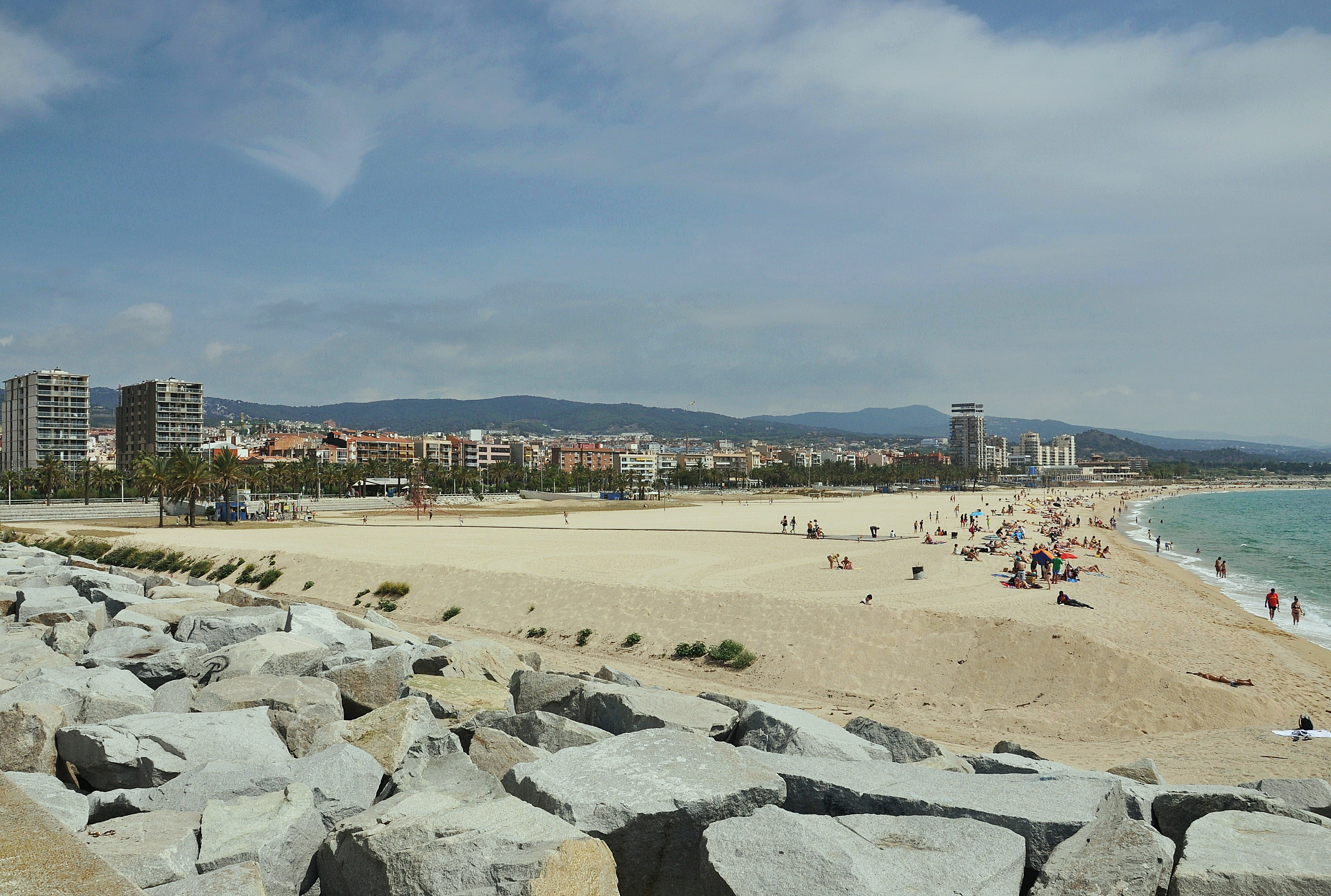 maresme-cataluña